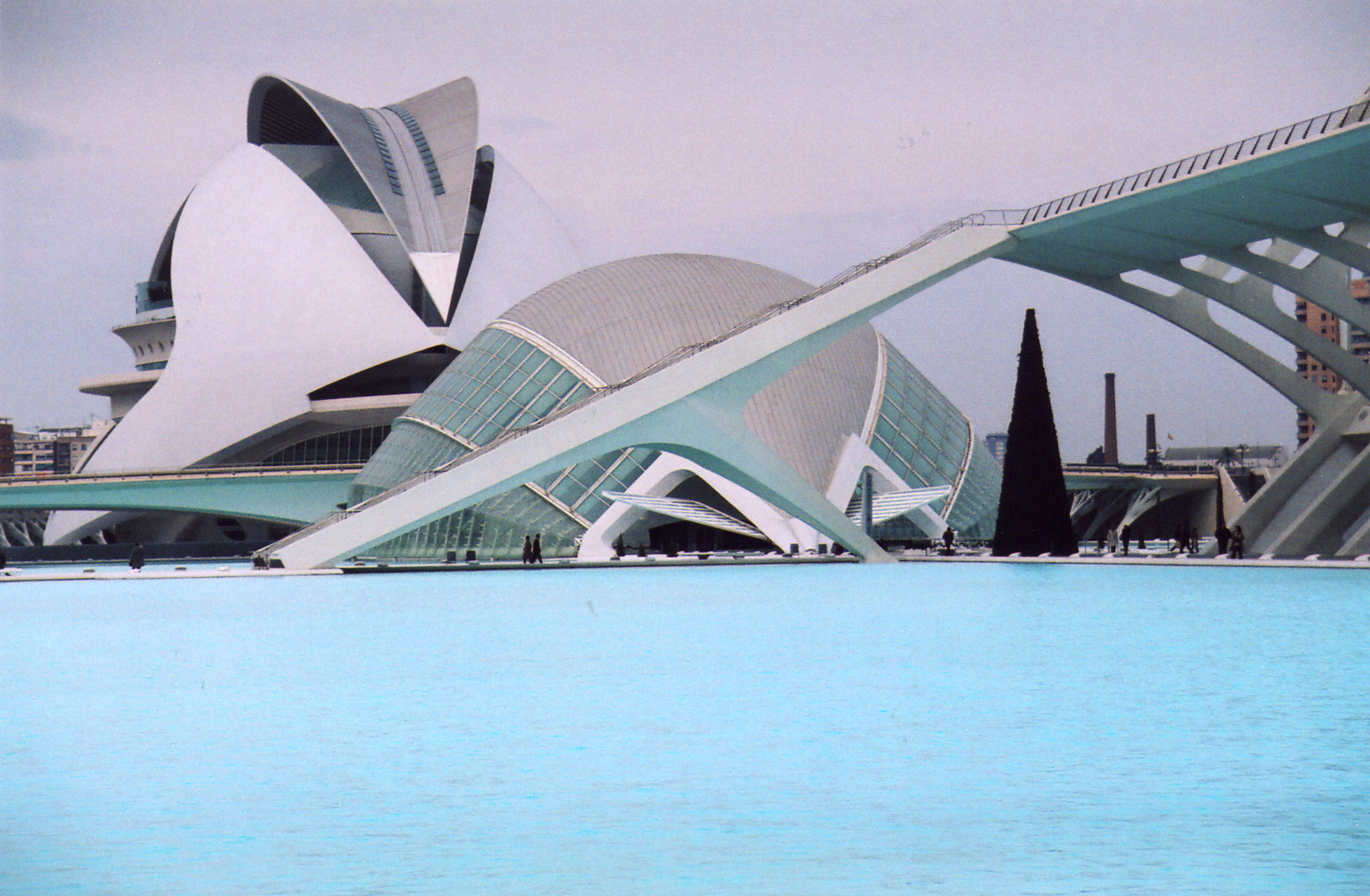 L'Hemisfèric and Palau de les Arts, Valencia-España